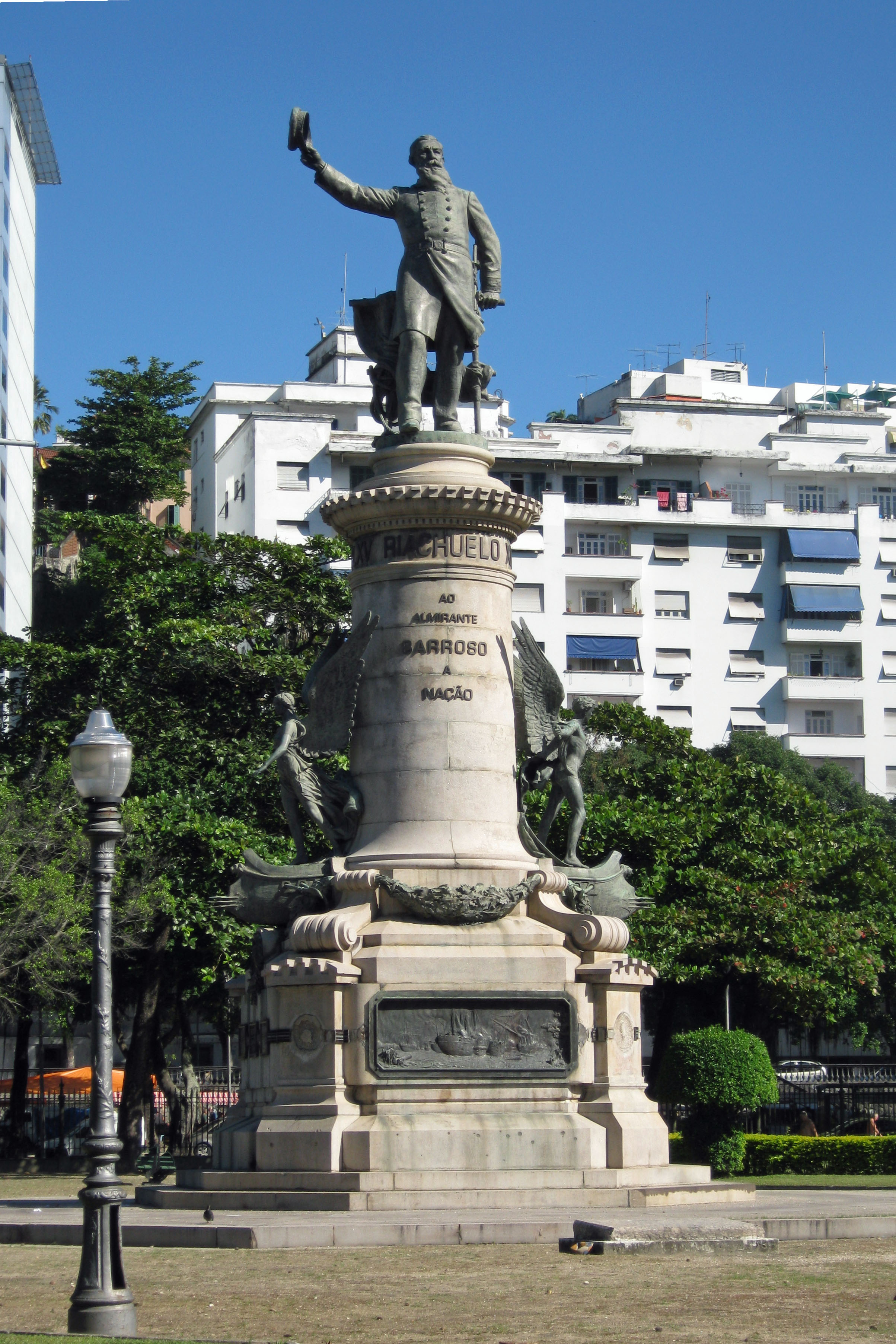 Monumento ao Almirante Barroso